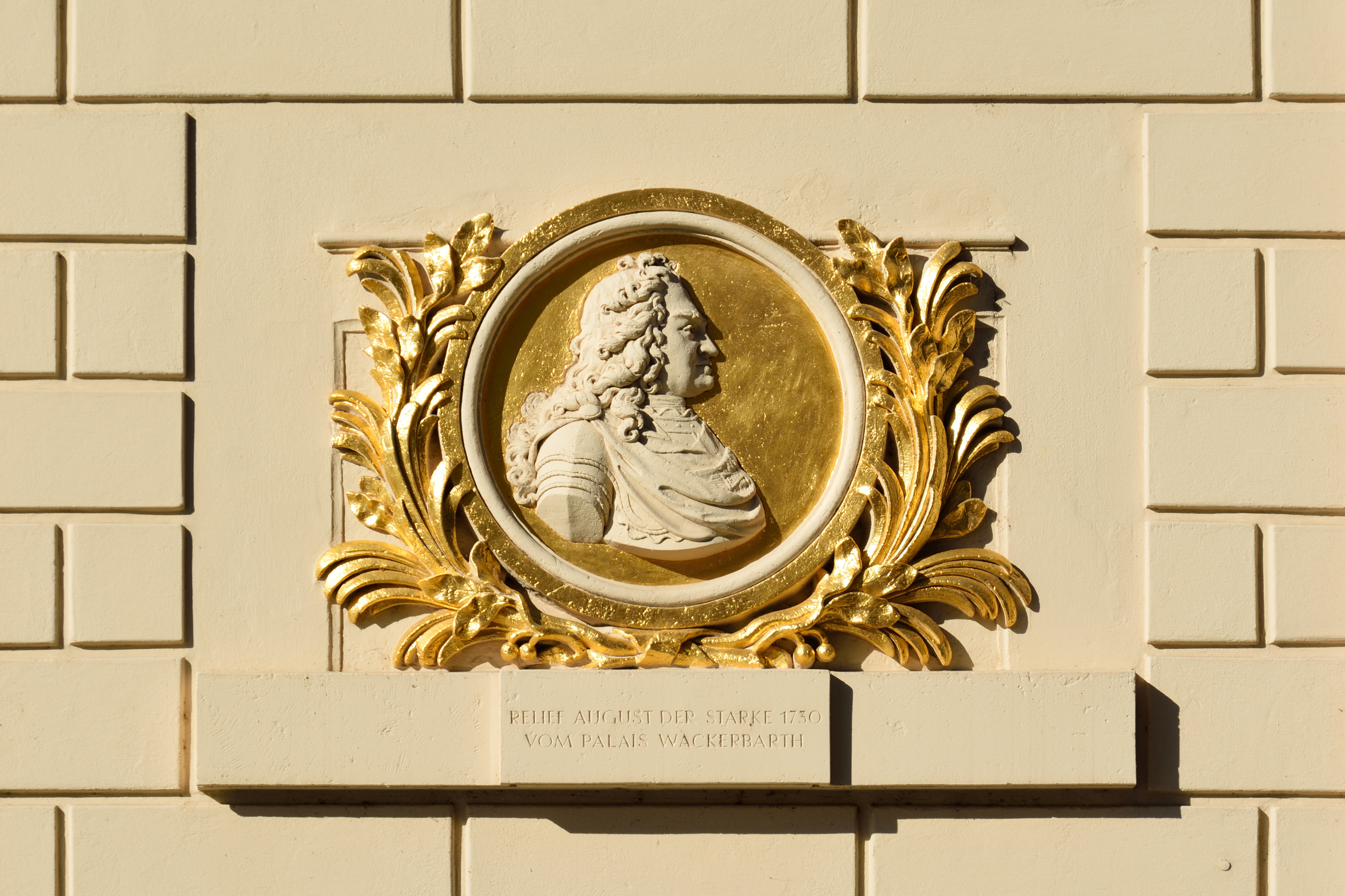 Impressionen aus Dresden am Vortag der Wikicon 2015 Relief am Johanneum in Dresden